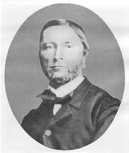 Heinrich Brunn (1822–1894), deutscher klassischer Philologe. Originalphotographie aus dem Besitz der Universitätsbibliothek München.